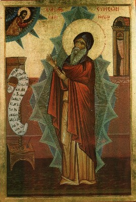 икона преп. Симеона Нового Богослова